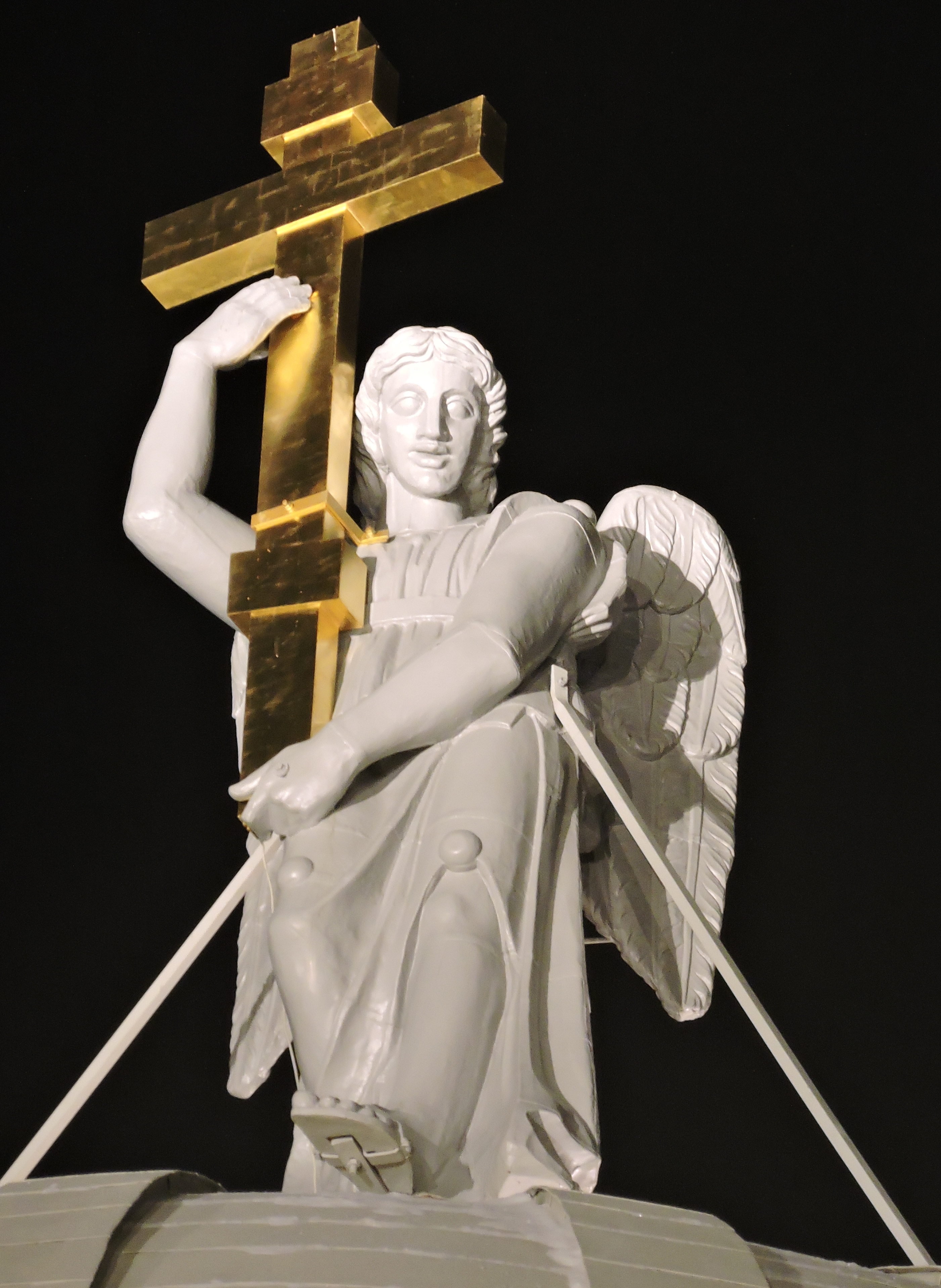 Ангел на куполе церкви Святой Екатерины